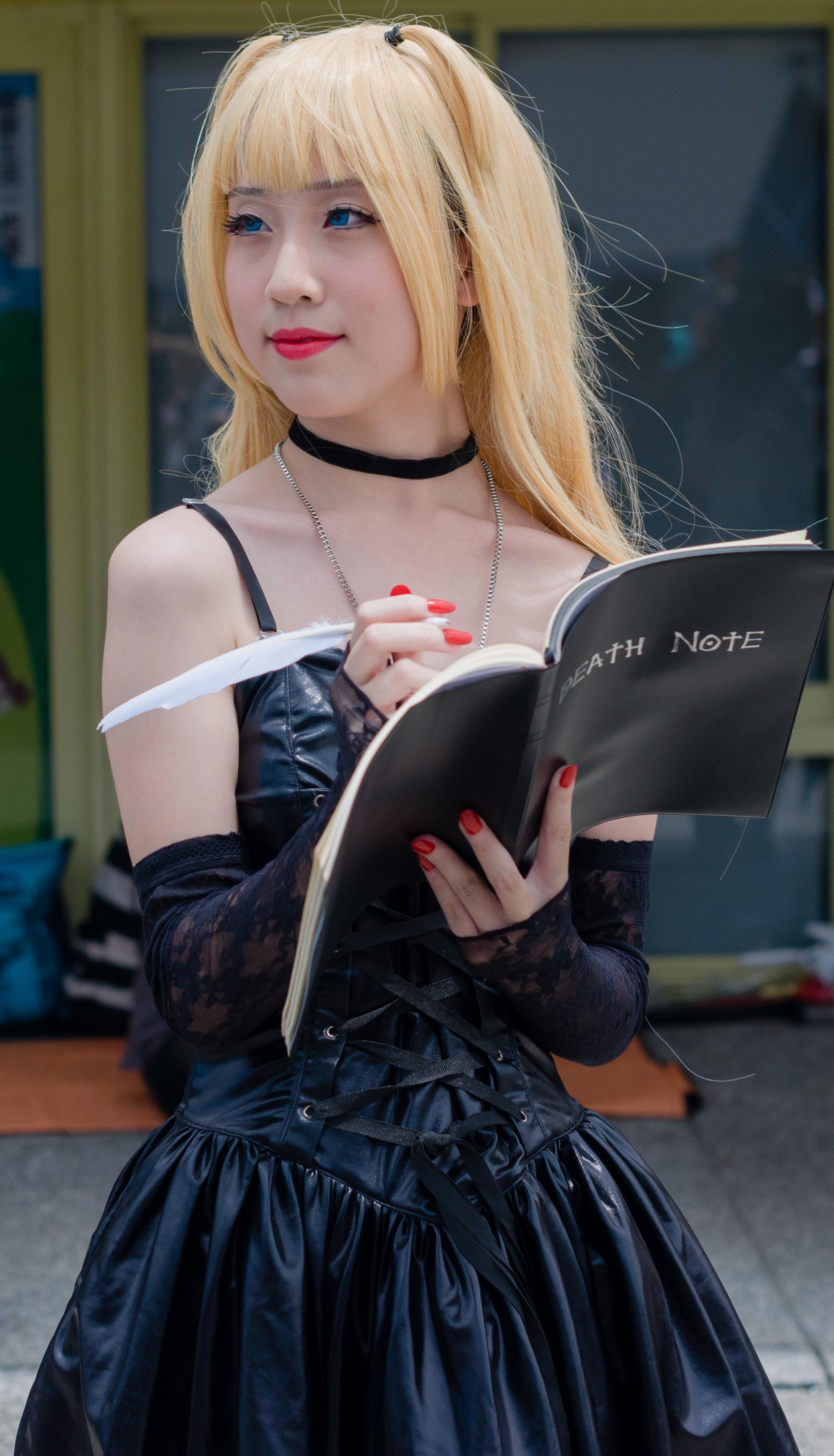 第30屆開拓動漫祭，《死亡筆記本》彌海砂cosplayer。